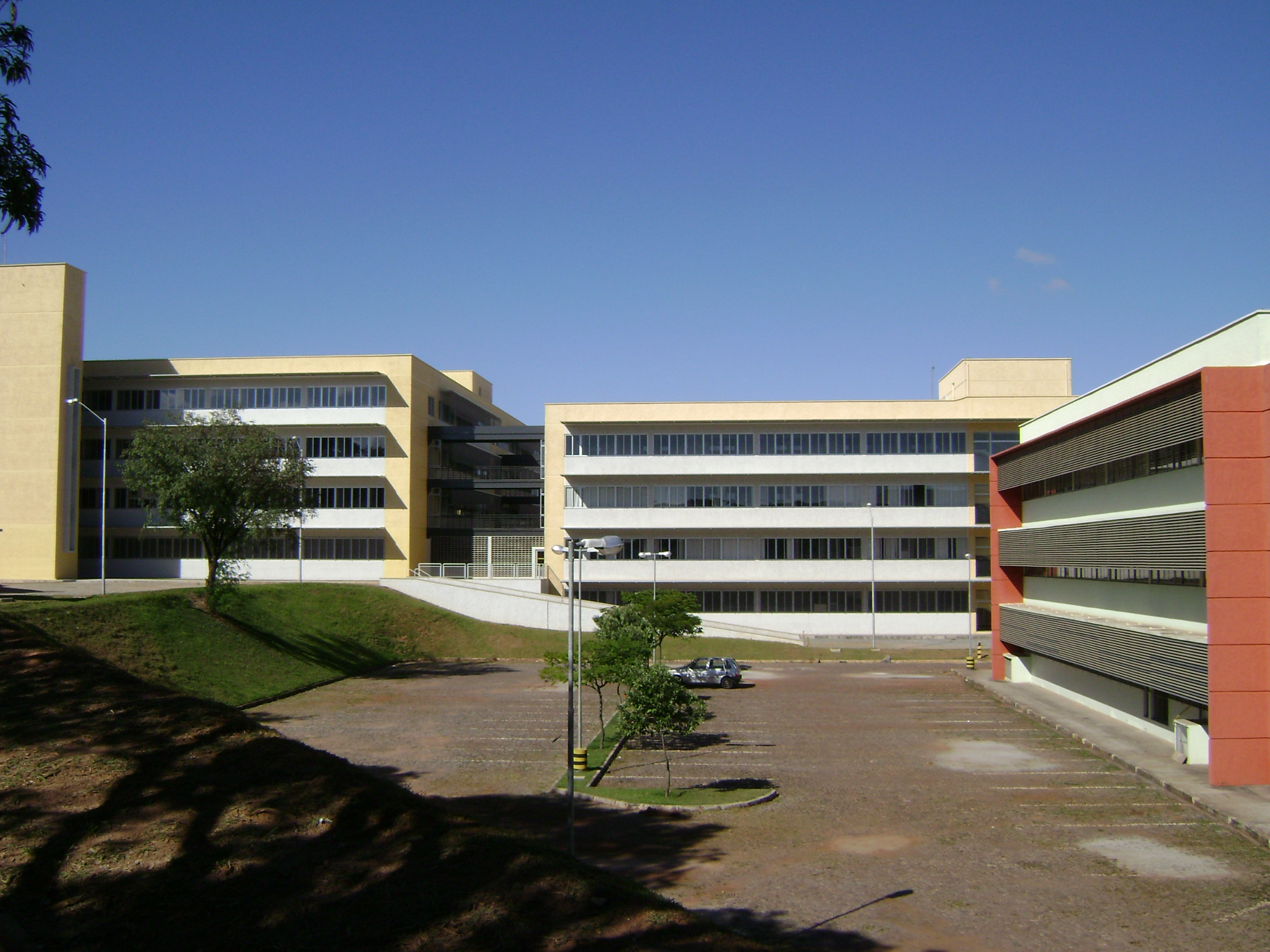 Prédio da Escola de Engenharia da Universidade Federal de Minas Gerais, em Belo Horizonte, Minas Gerais, Brasil.